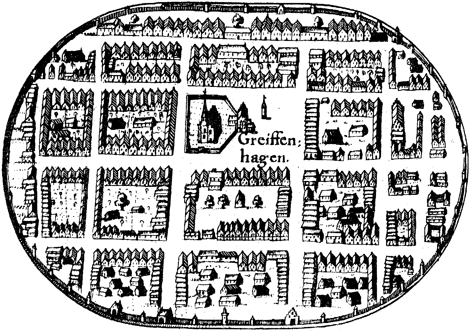 Rycina miasta Gryfino z mapy Lubinusa - Mapa księstwa pomorskiego z 1618 roku.